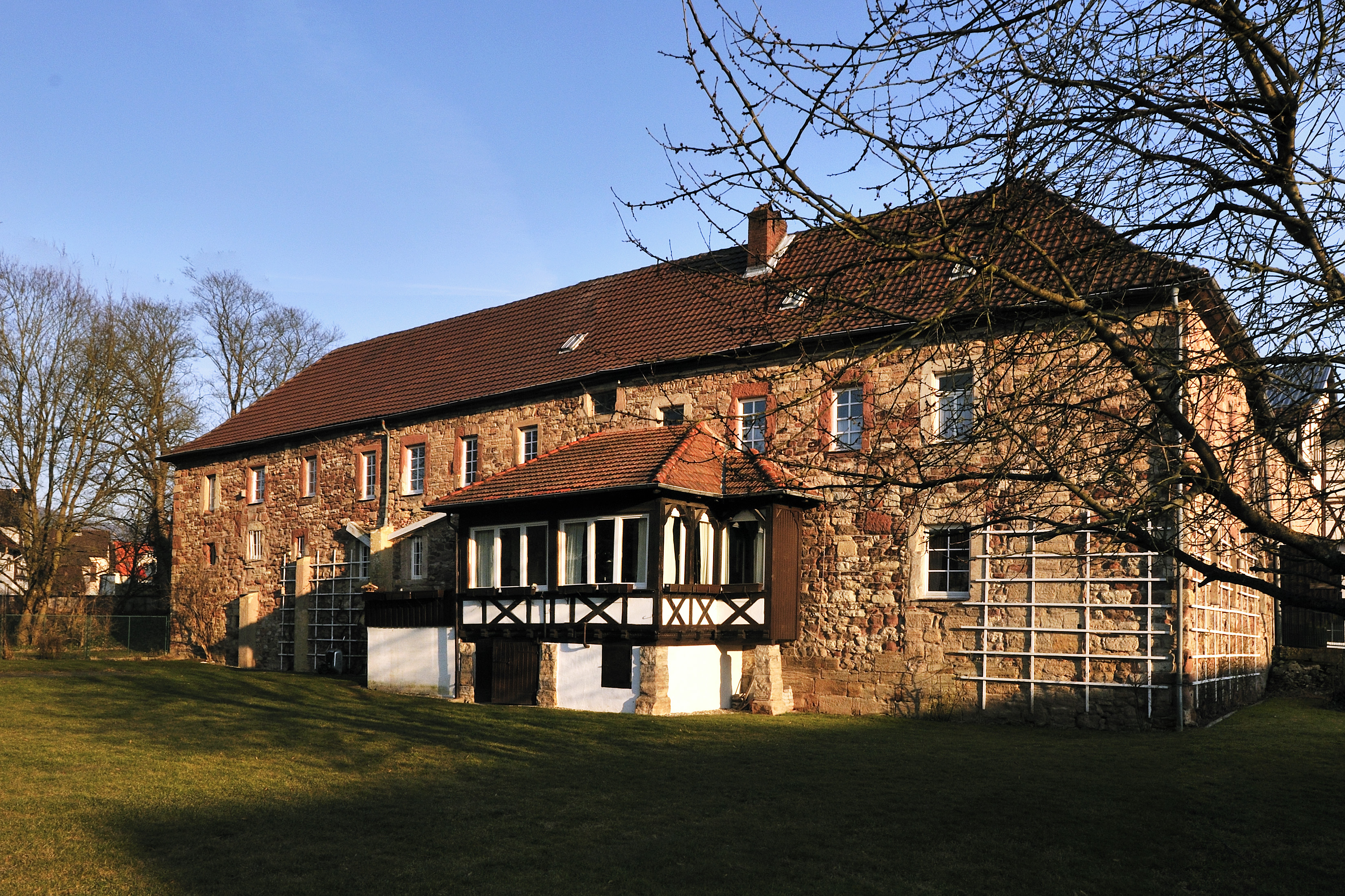 Schloss